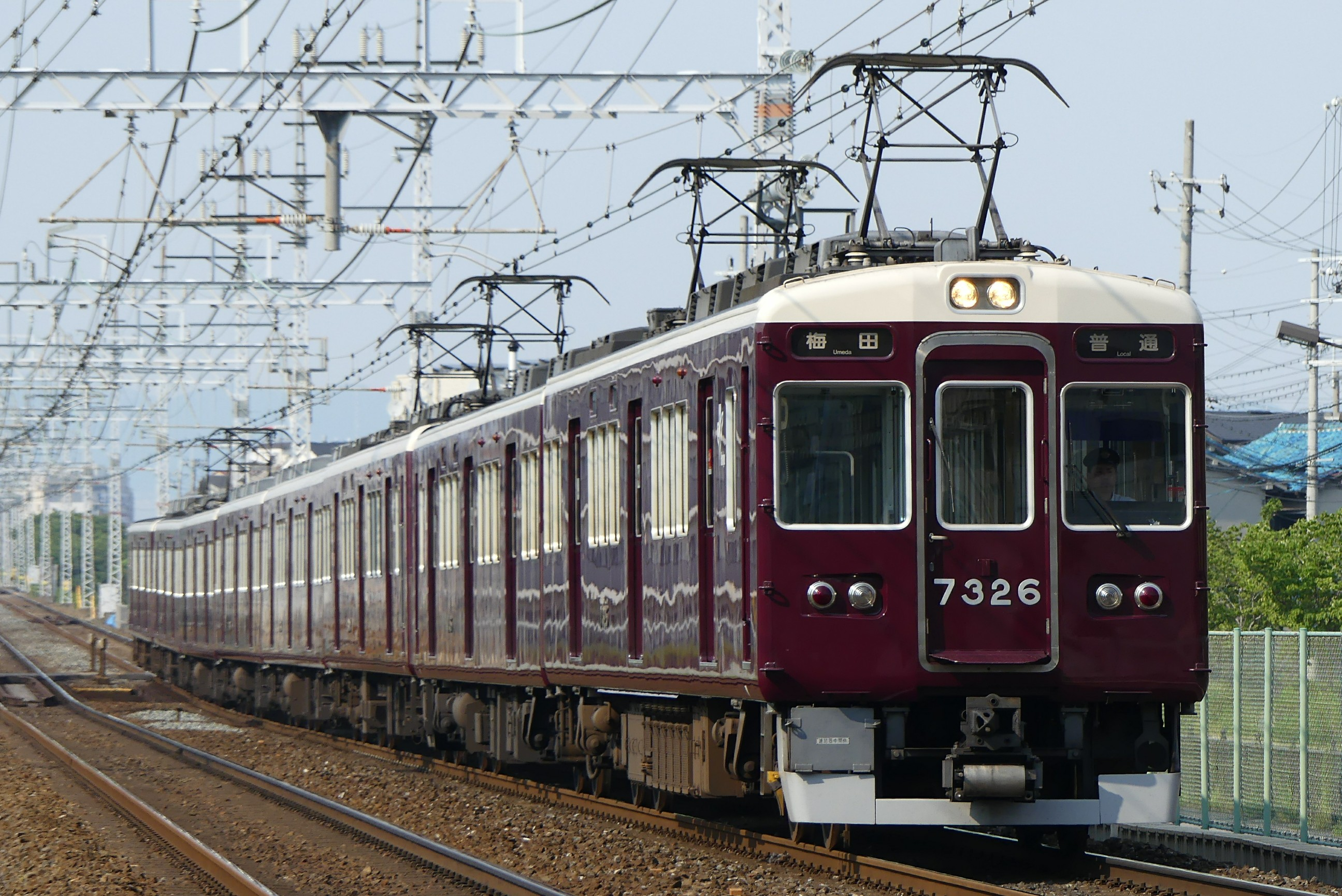 阪急電鉄7300系電車